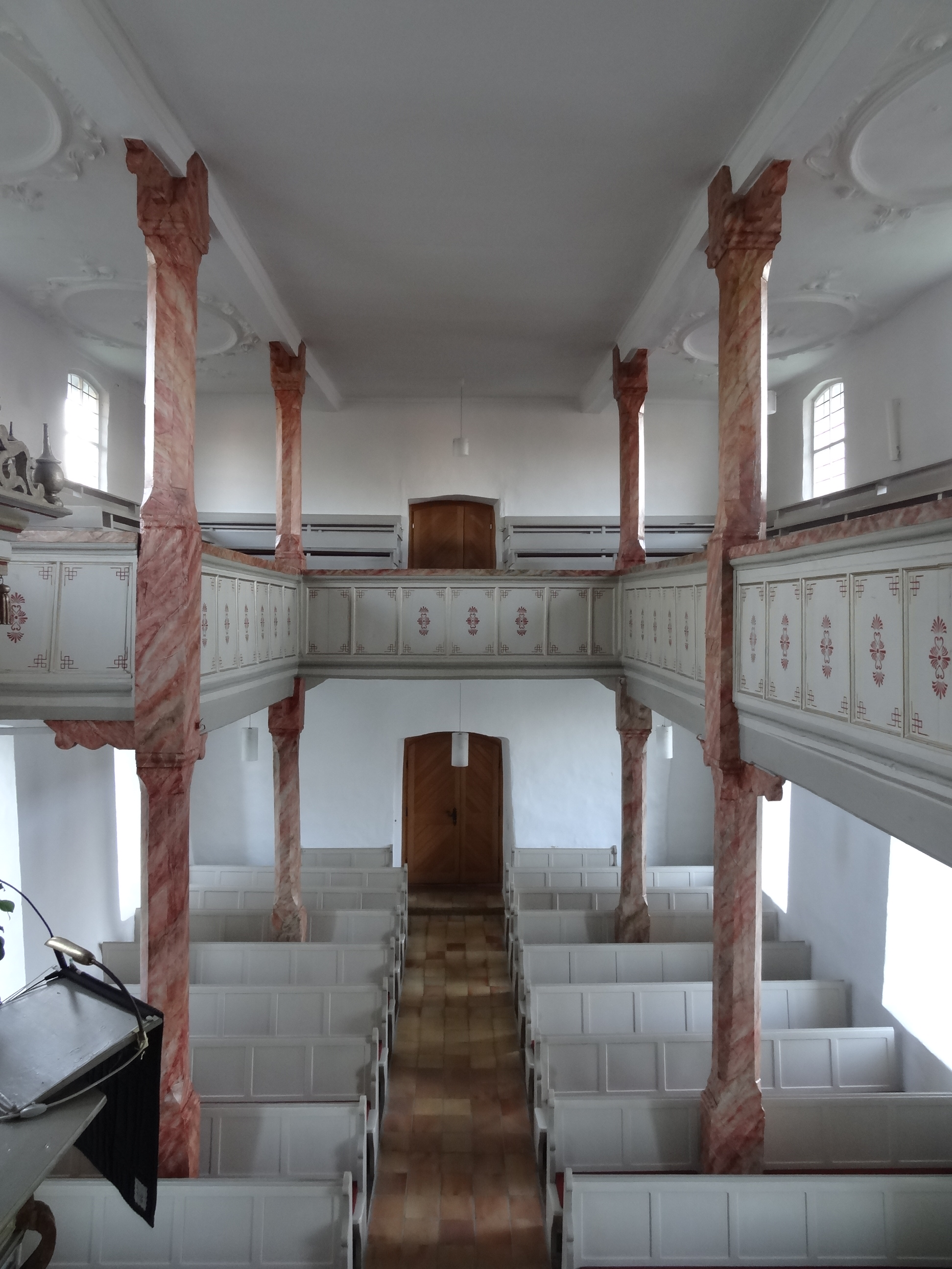 Evangelische Kirche Villingen (Hungen)